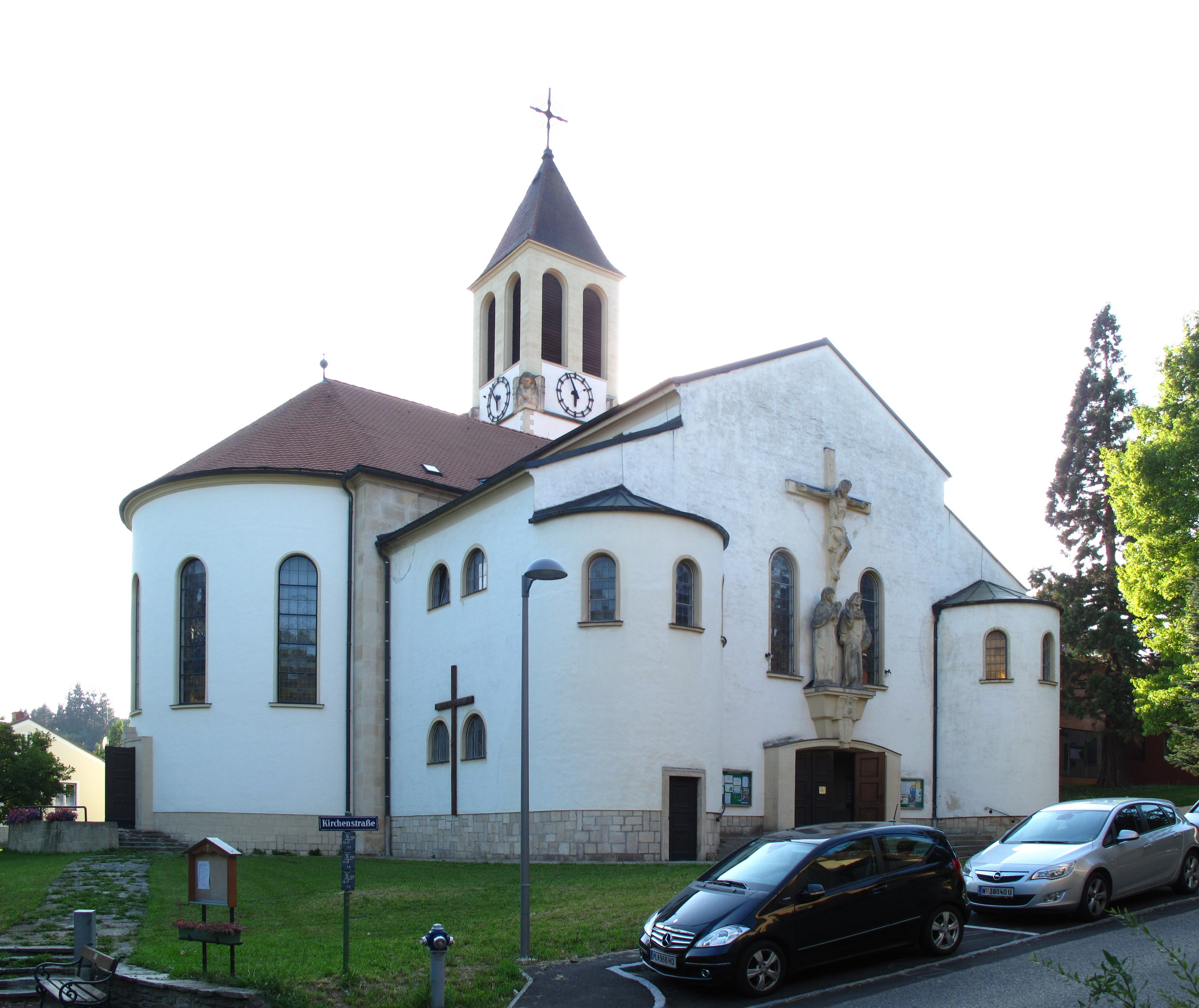 Kath. Pfarrkirche Herz Jesu, Friedenskirche, sog. Wienerwalddom, 3032 Eichgraben, Kirchenstraße